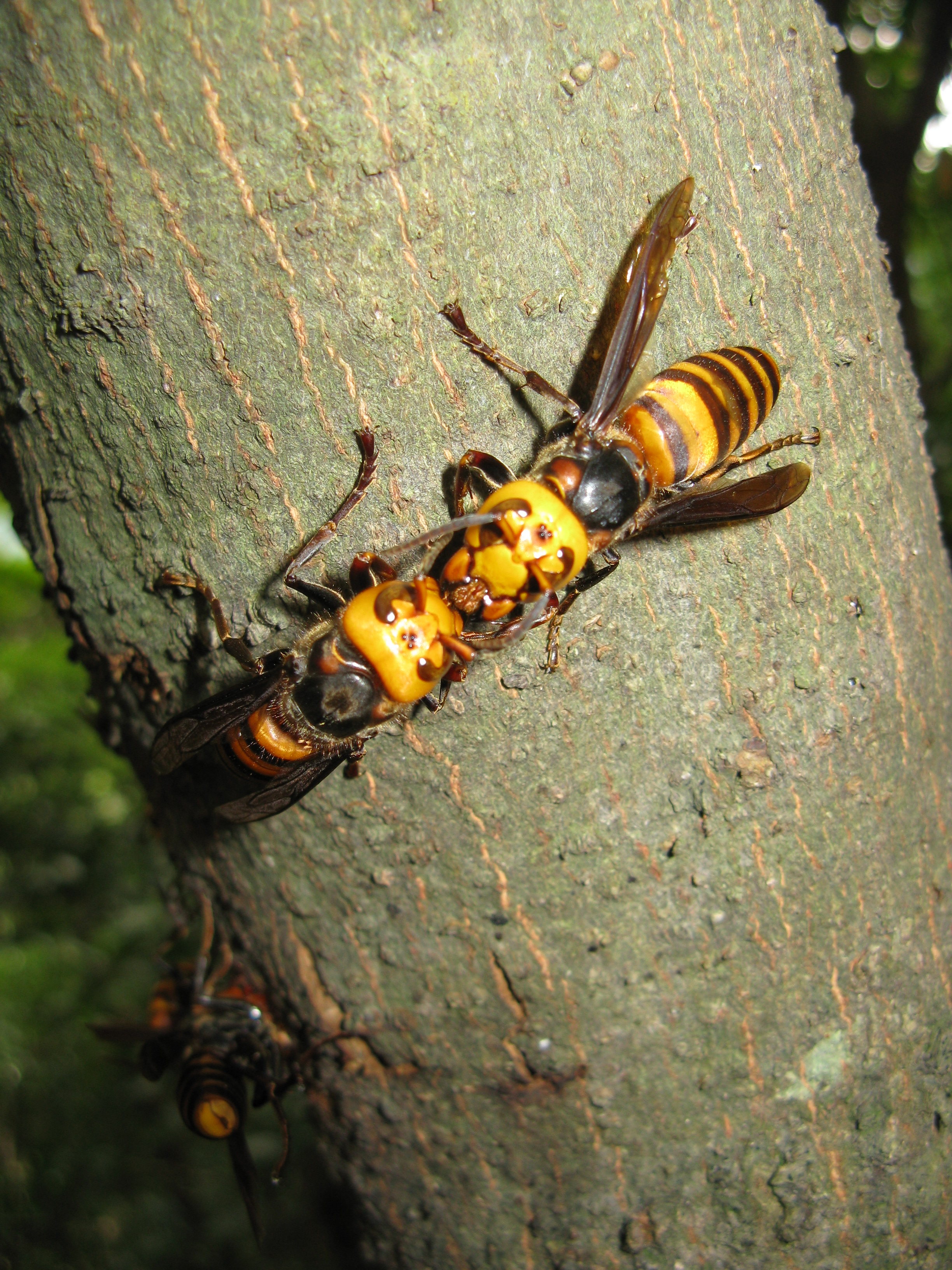 Vespa mandarinia japonica, Osaka, Japan